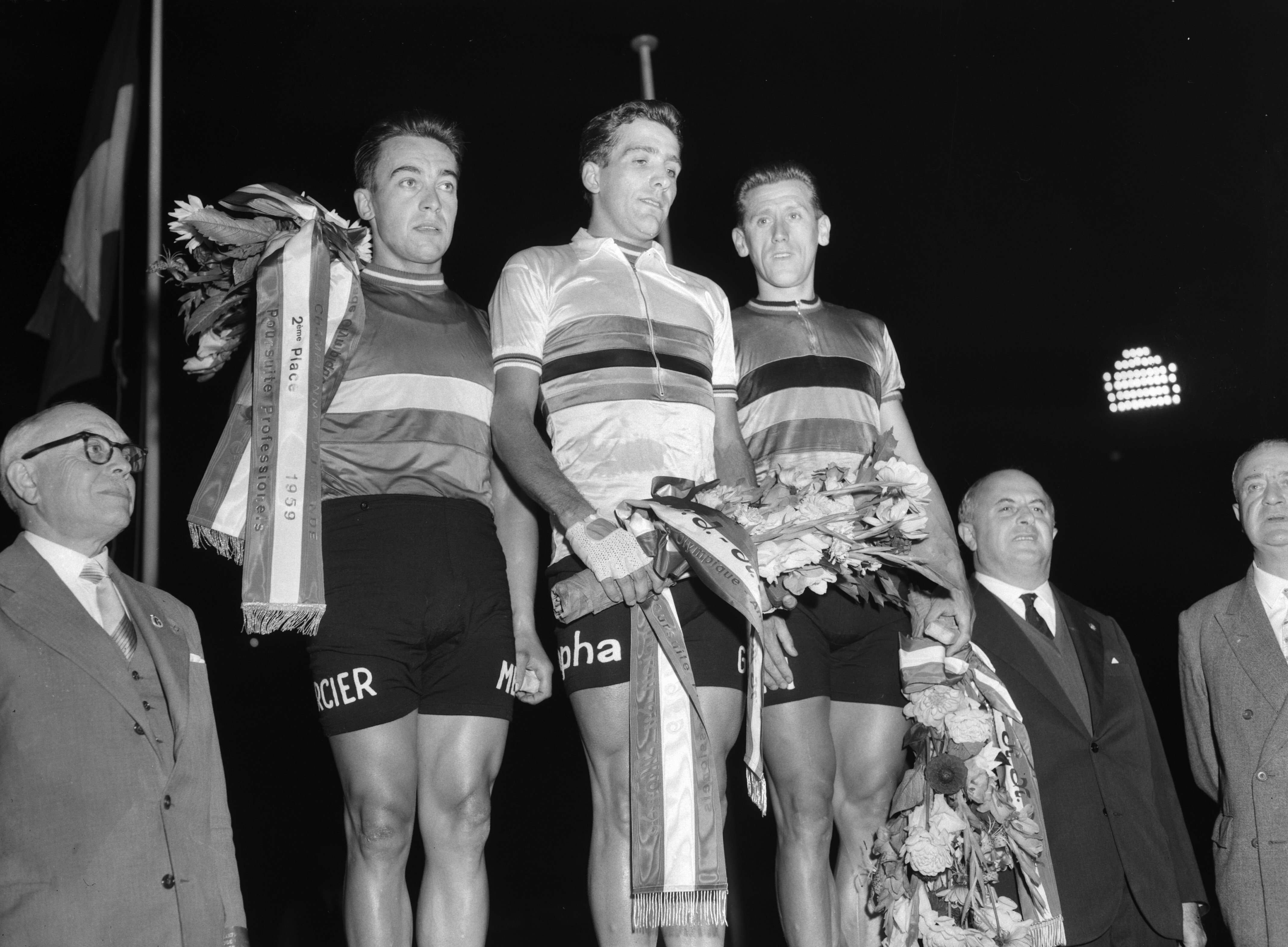 Wereldkampioenschap wielrennen op de baan in Amsterdam v.l.n.r. Bouvet, Riviere en Brankart